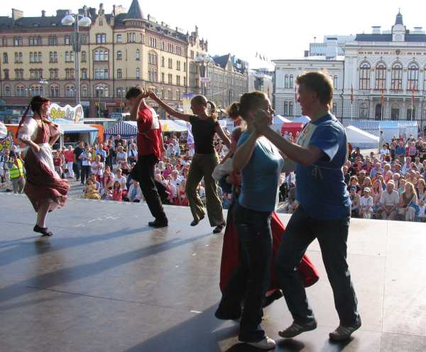 Polkan SM-kisat Pispalan Sottiisissa Tampereella 2006